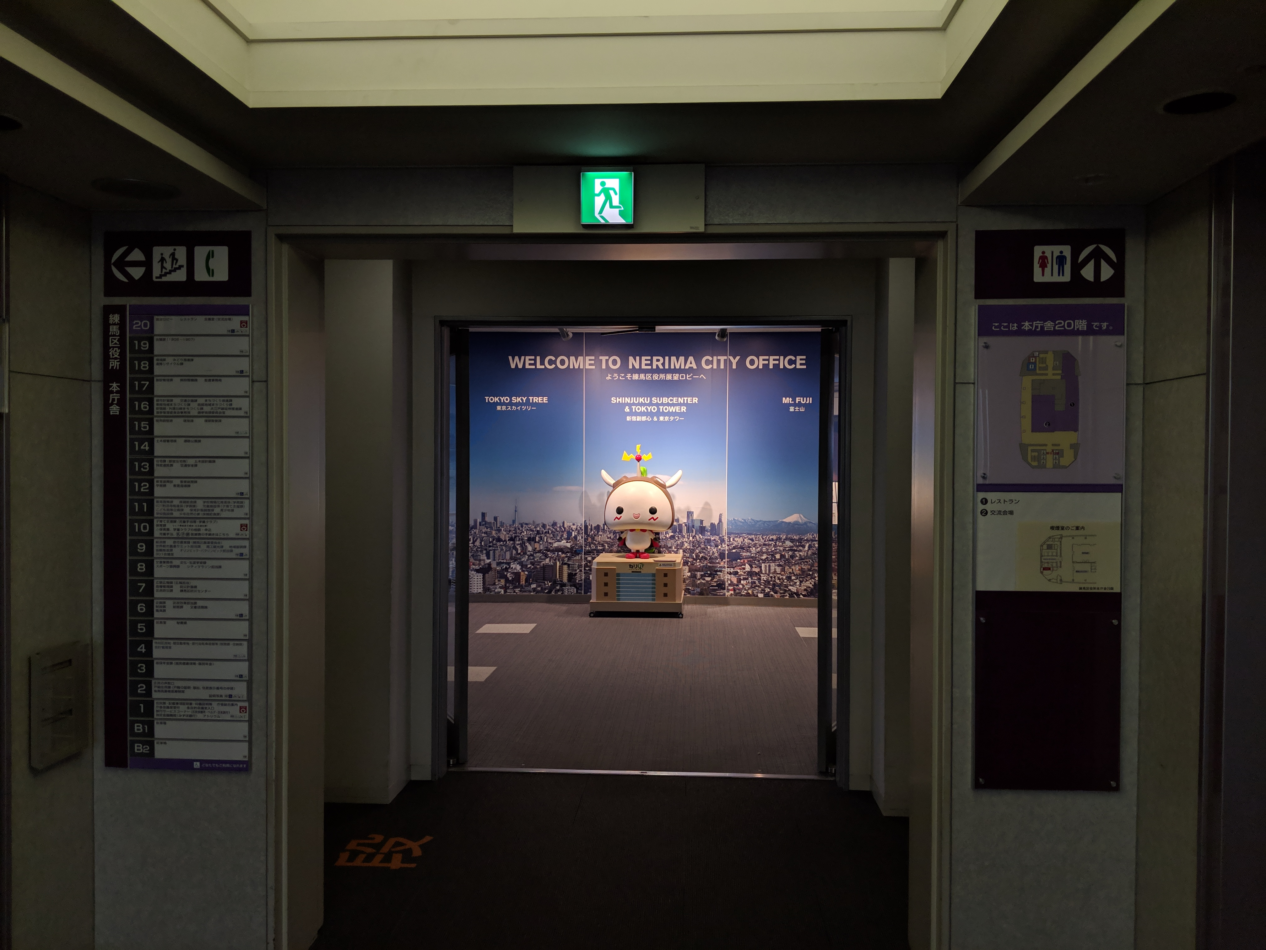 练马区役所20层观景台入口